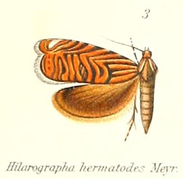 Hilarographa hermatodes